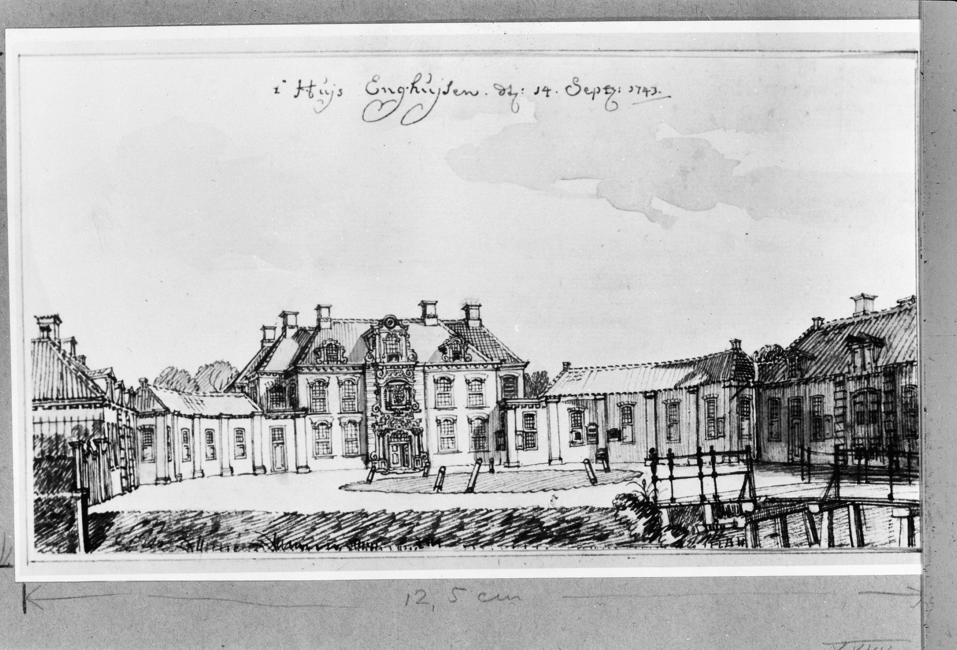 Paviljoen Enghuizen: overzicht, door J.de Beyer